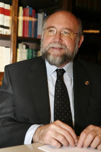 José María Davó